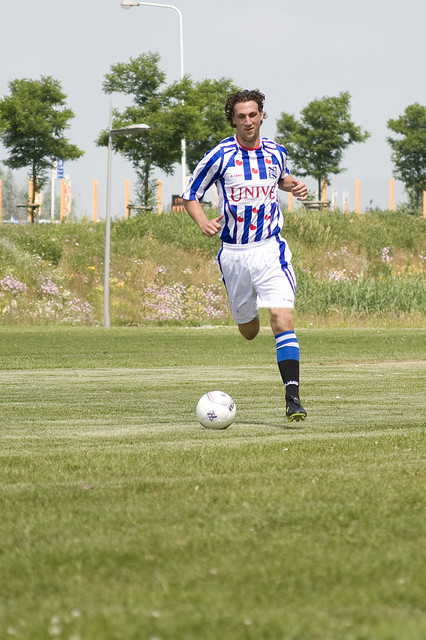 Geert Arend Roorda